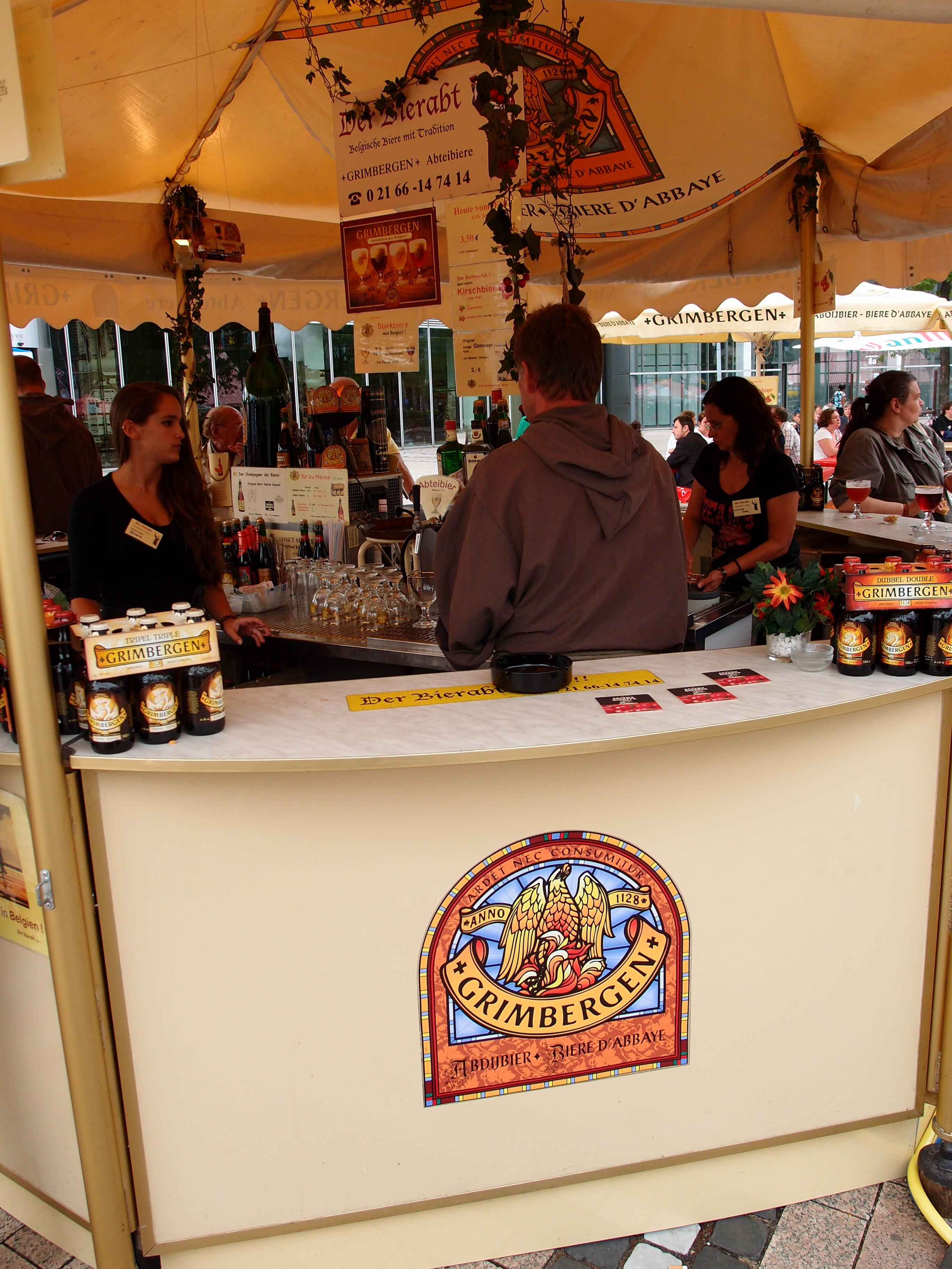 Kölner Bierbörse (August 2012), Mediapark (Grimbergen Stand) Datum: 24.08.2012 Urheber: M. Pfeiffer alias Benutzer:Gordito1869 Quelle: privates Fotoarchiv des Urhebers